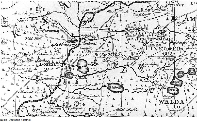 Original image description from the Deutsche Fotothek Karte des Marggraffenthums Nieder Lausitz von Petrus Schenk, 1757 (Sign.: VII 67)